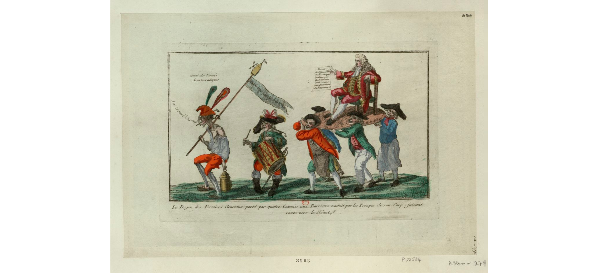 Le Doyen des fermiers généraux porté par quatre commis aux barrières conduit par les troupes de son corps faisant route vers le néant. Estampe, non identifié - Domaine Public